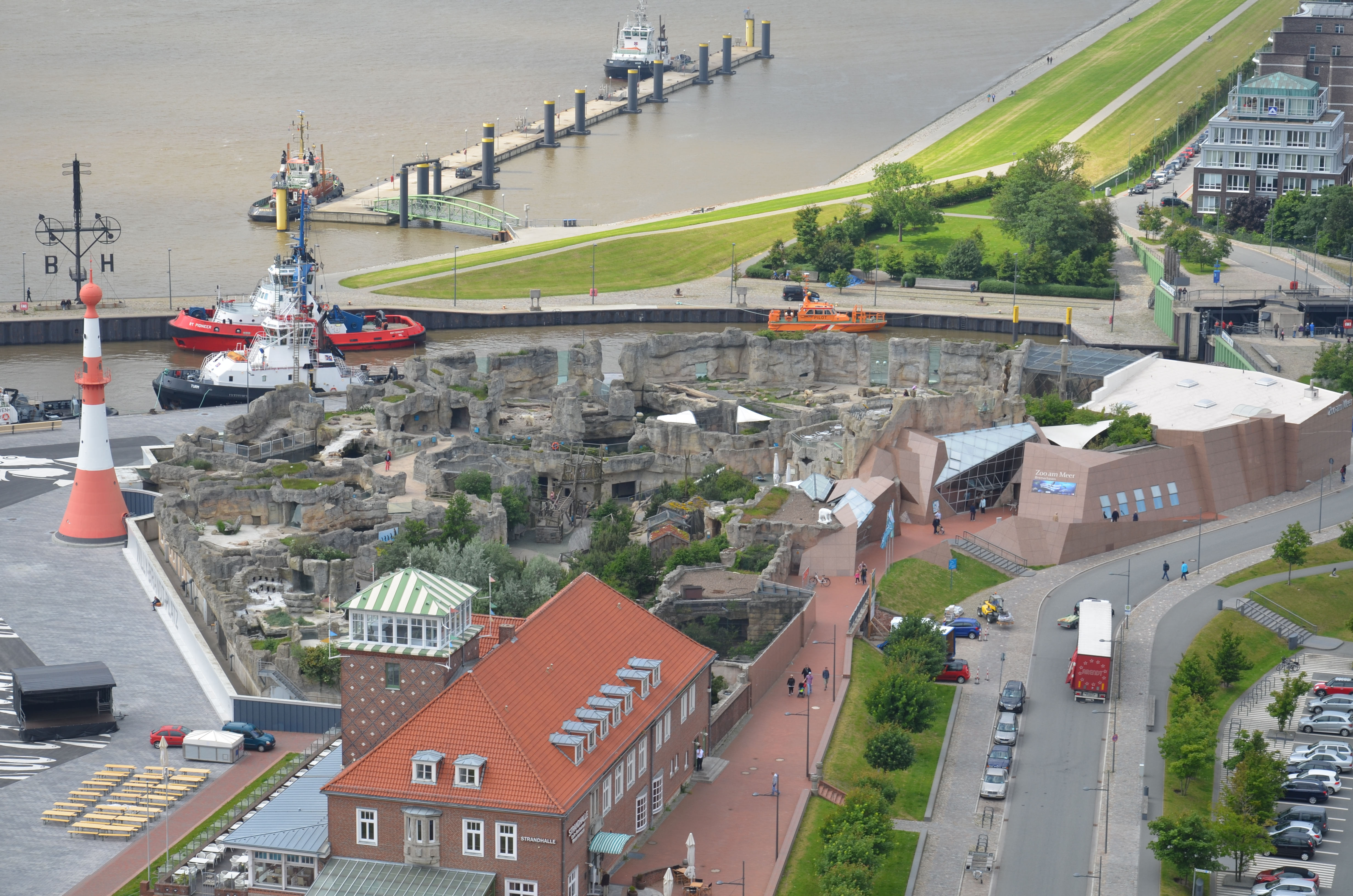 Ausblick vom Atlantic-Hotel auf Zoo, Schleuseneinfahrt mit Schleppern, Minerett, Wasserstandszeigern, Strandhalle.